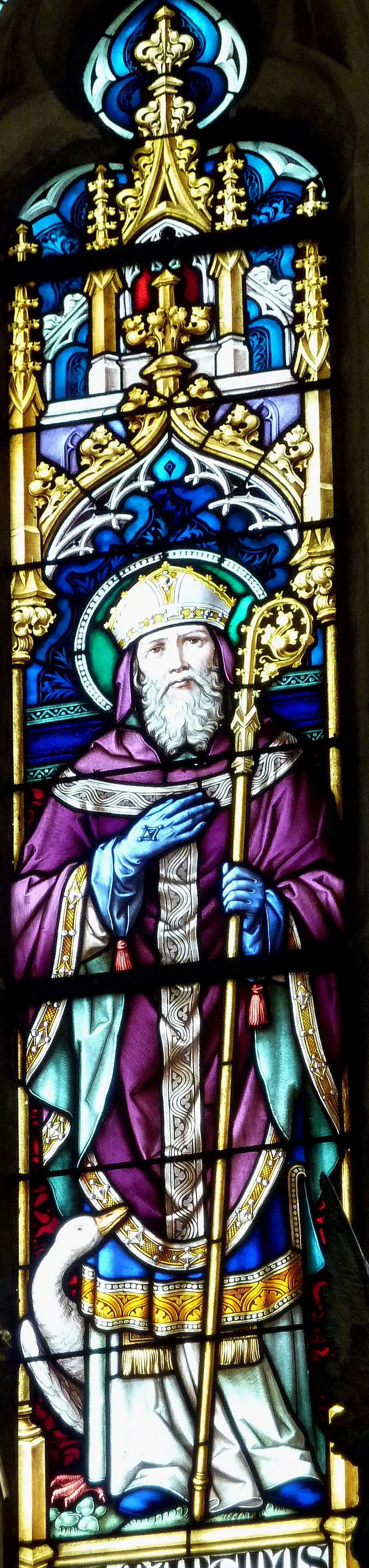 Katholische Pfarrkirche St. Martin in Staufen (Gemeinde Syrgenstein) im Landkreis Dillingen an der Donau, mittleres Chorfenster mit der Darstellung des hl. Martins, zu seinen Füßen ist eine Gans dargestellt